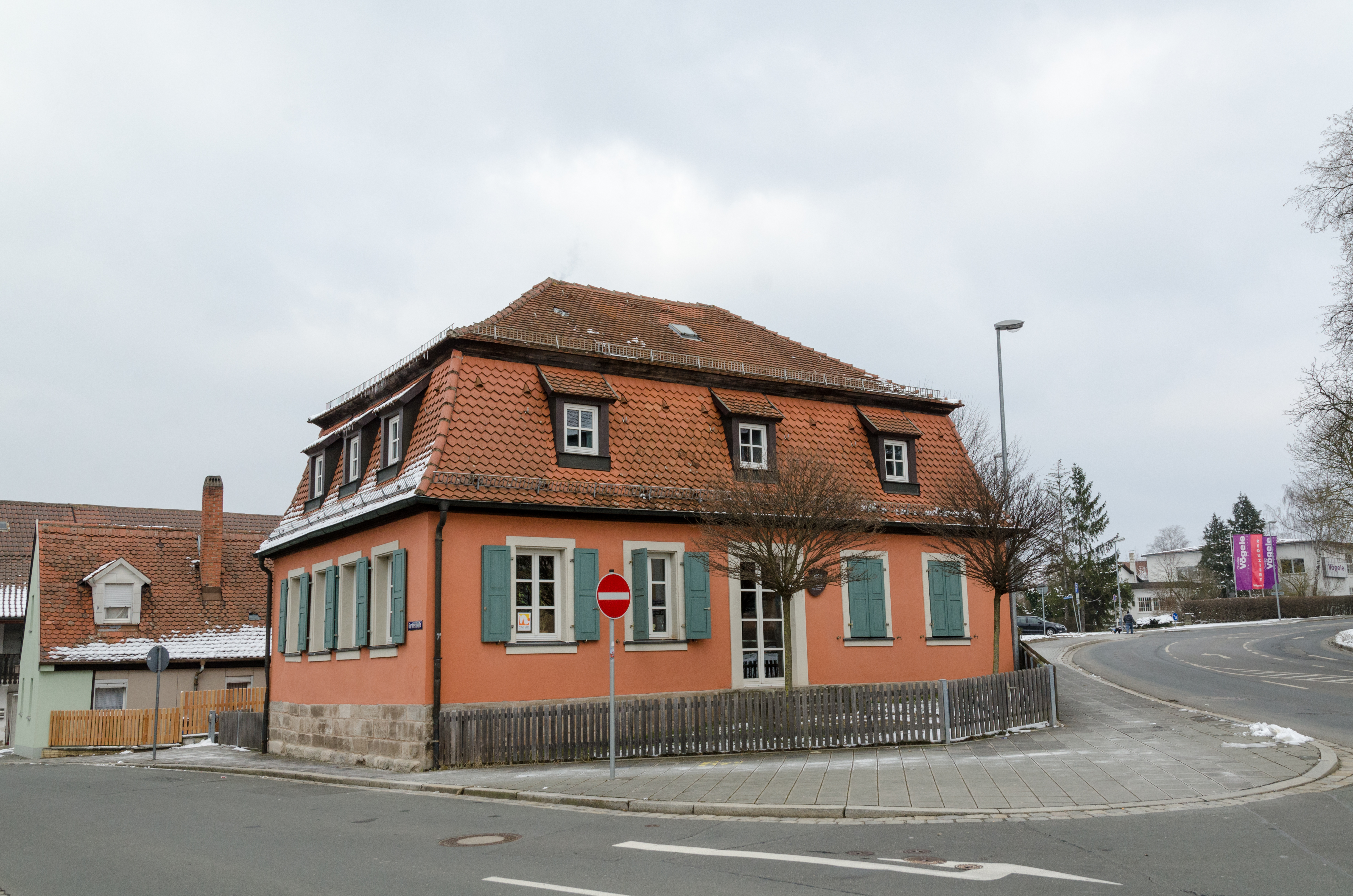 Neustadt an der Aisch, Nürnberger Straße 41